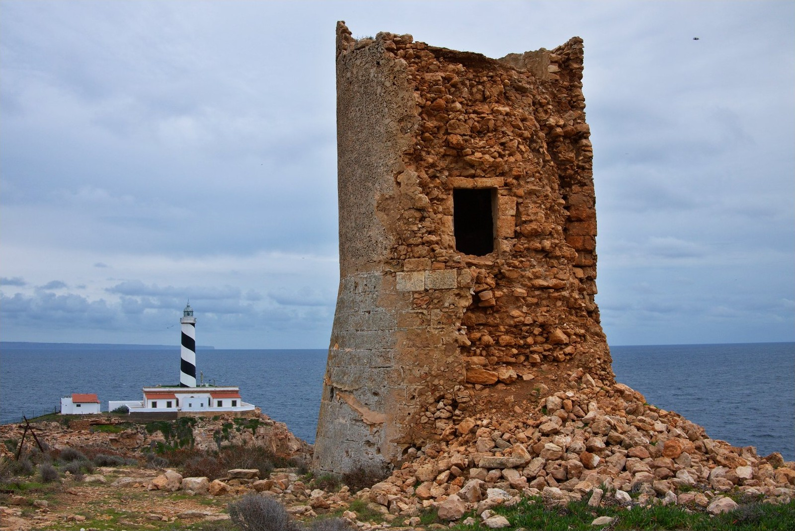 Es tracta d'una torre de planta circular i alçat format per la juxtaposició d'un cilindre i un troncocònic construïda entre 1579 i 1582.